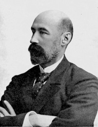 Ignacy Jasiukowicz - polski inżynier